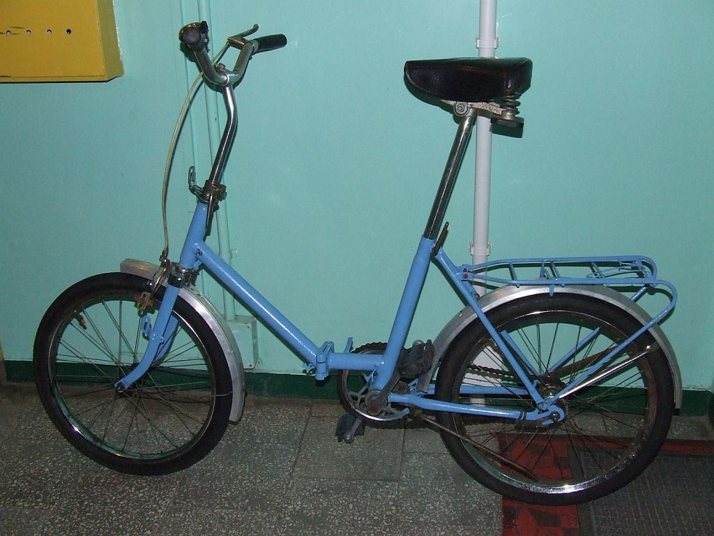 Rower Romet Sokół z 1973 roku wyprodukowany w zakładach PREDOM Romet w Bydgoszczy.